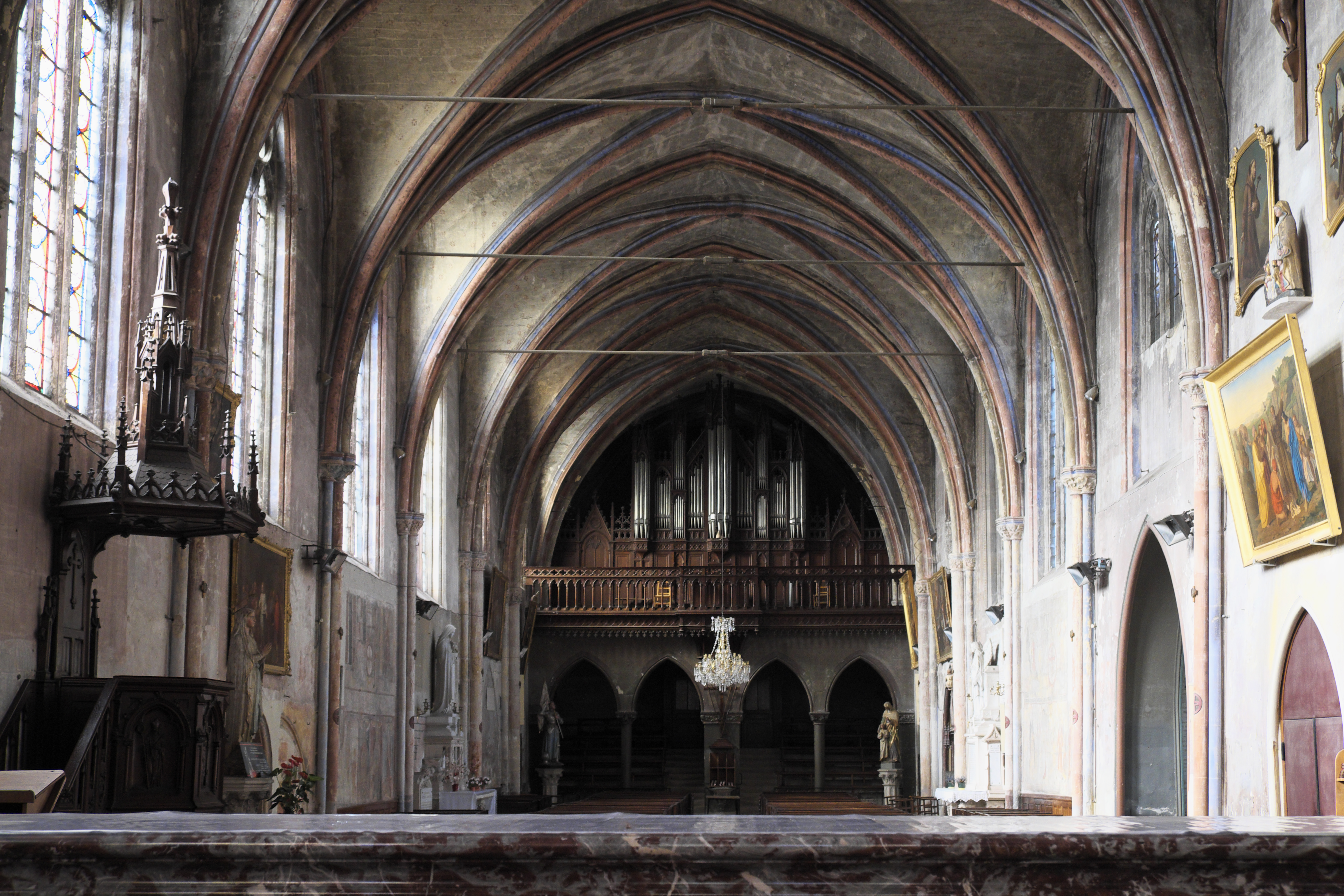 Katholische Saint-Antoine, ehemalige Klosterkirche der Augustinereremiten, in Bar-le-Duc im Département Meuse (Lothringen/Frankreich), Innenraum